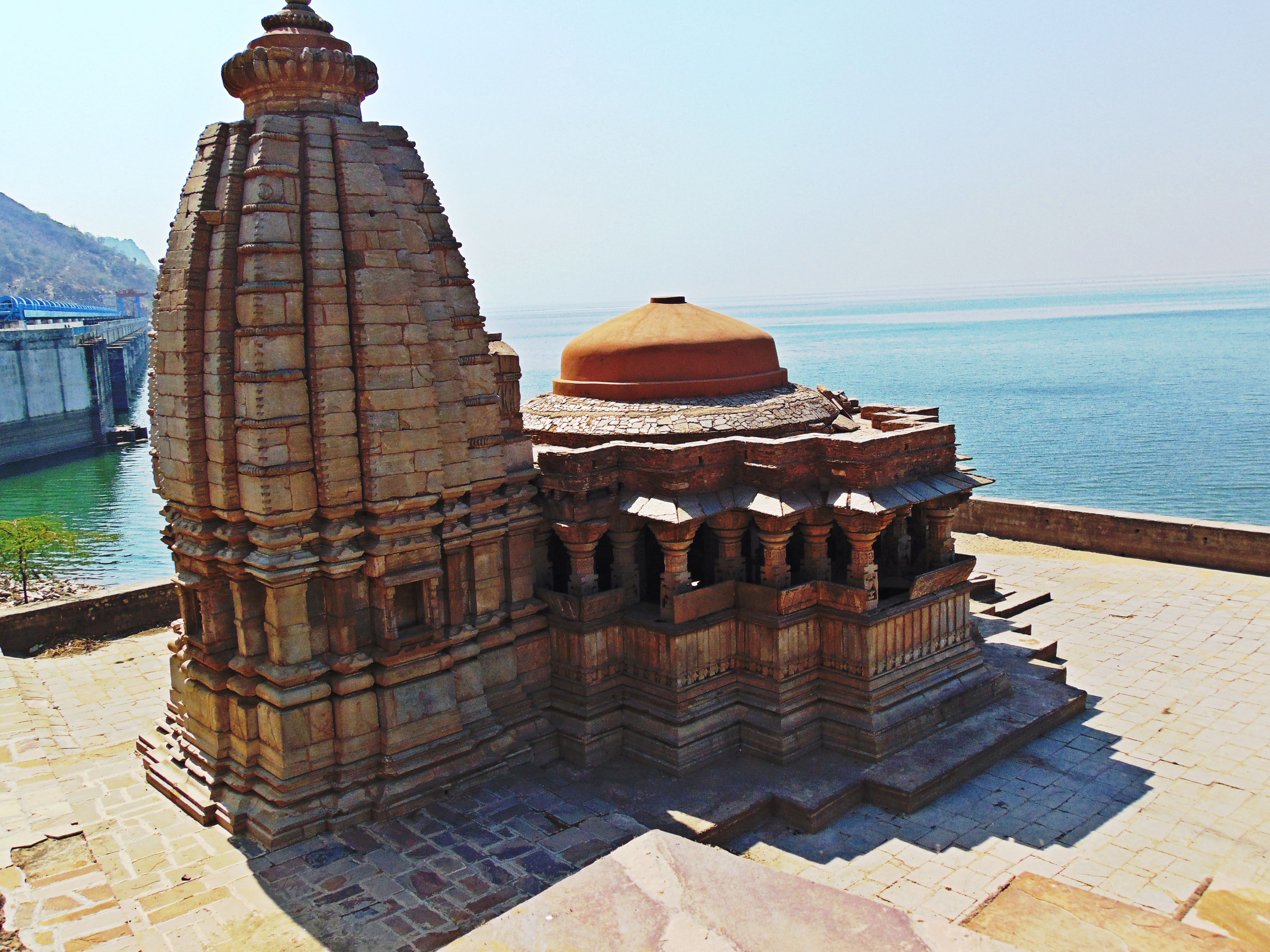 Bisalpur, Tonk